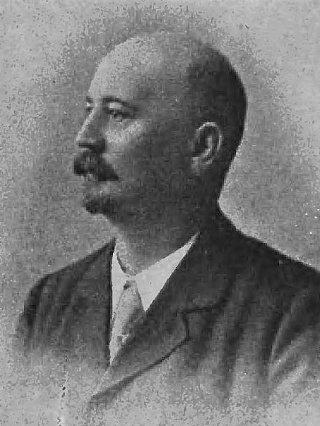 Antoni Pawluszkiewicz (-1907)